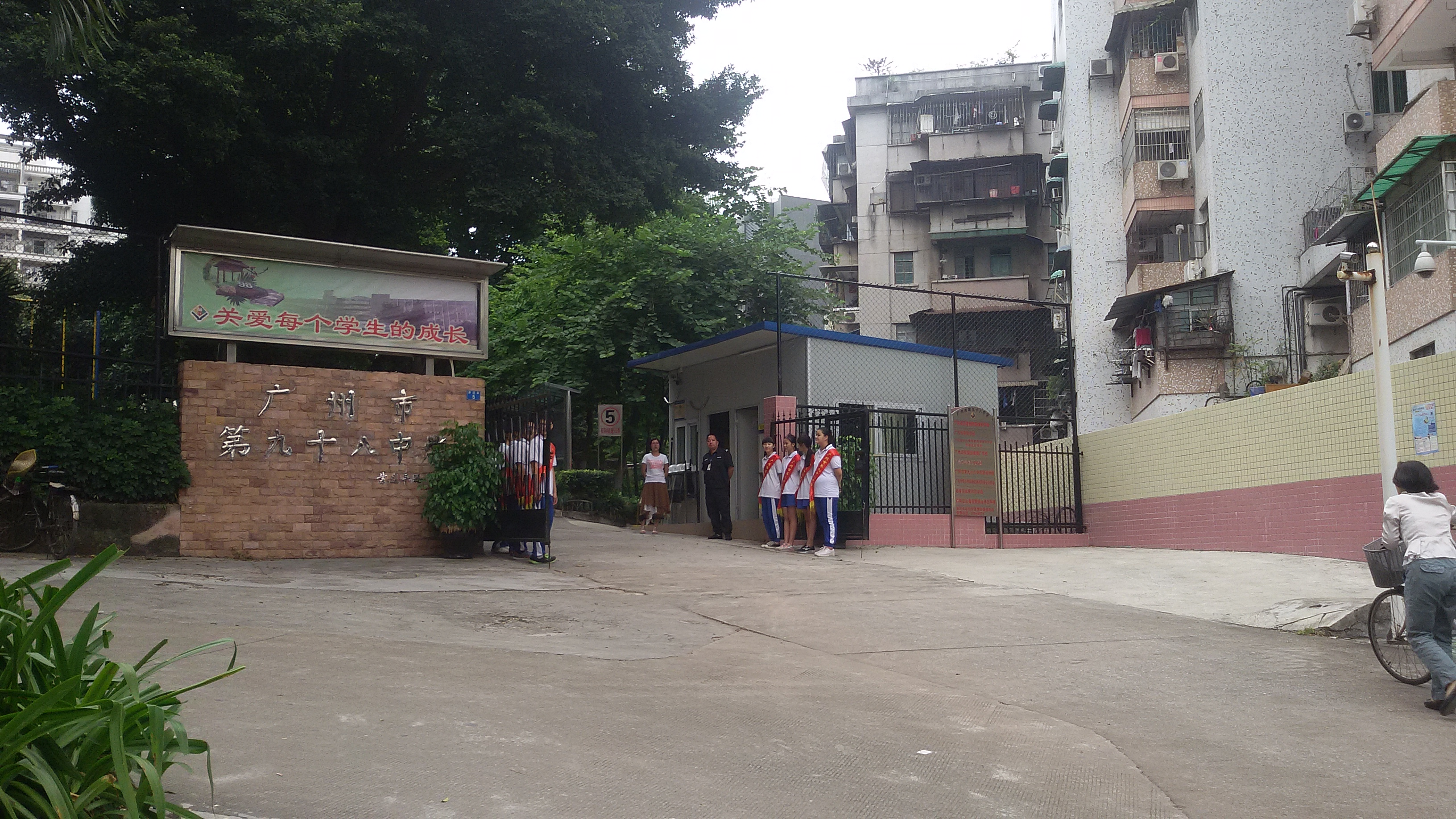 粵語: 广州市第98中学嘅正门